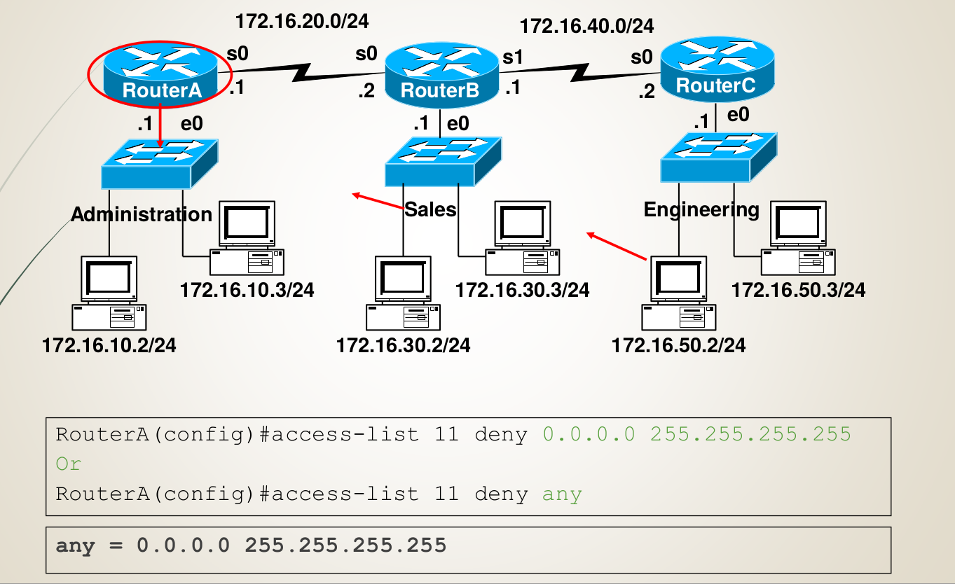 Монгол: Хандалтыг удирдах жагсаалт